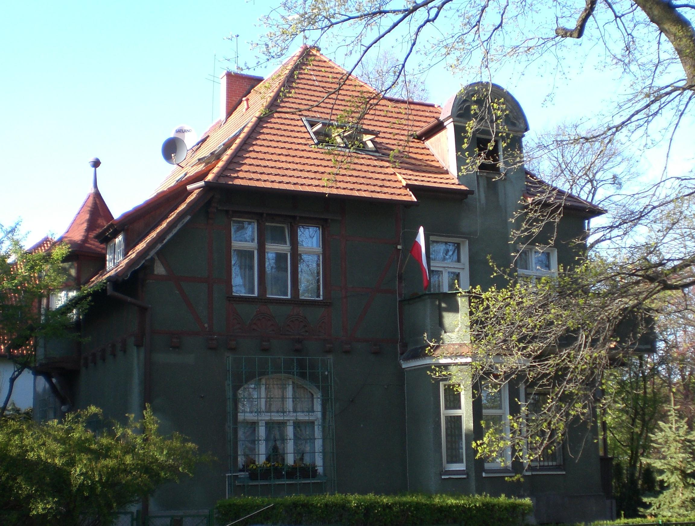 Gdańsk Aniołki - Willa Gdańskich Pięcioraczków